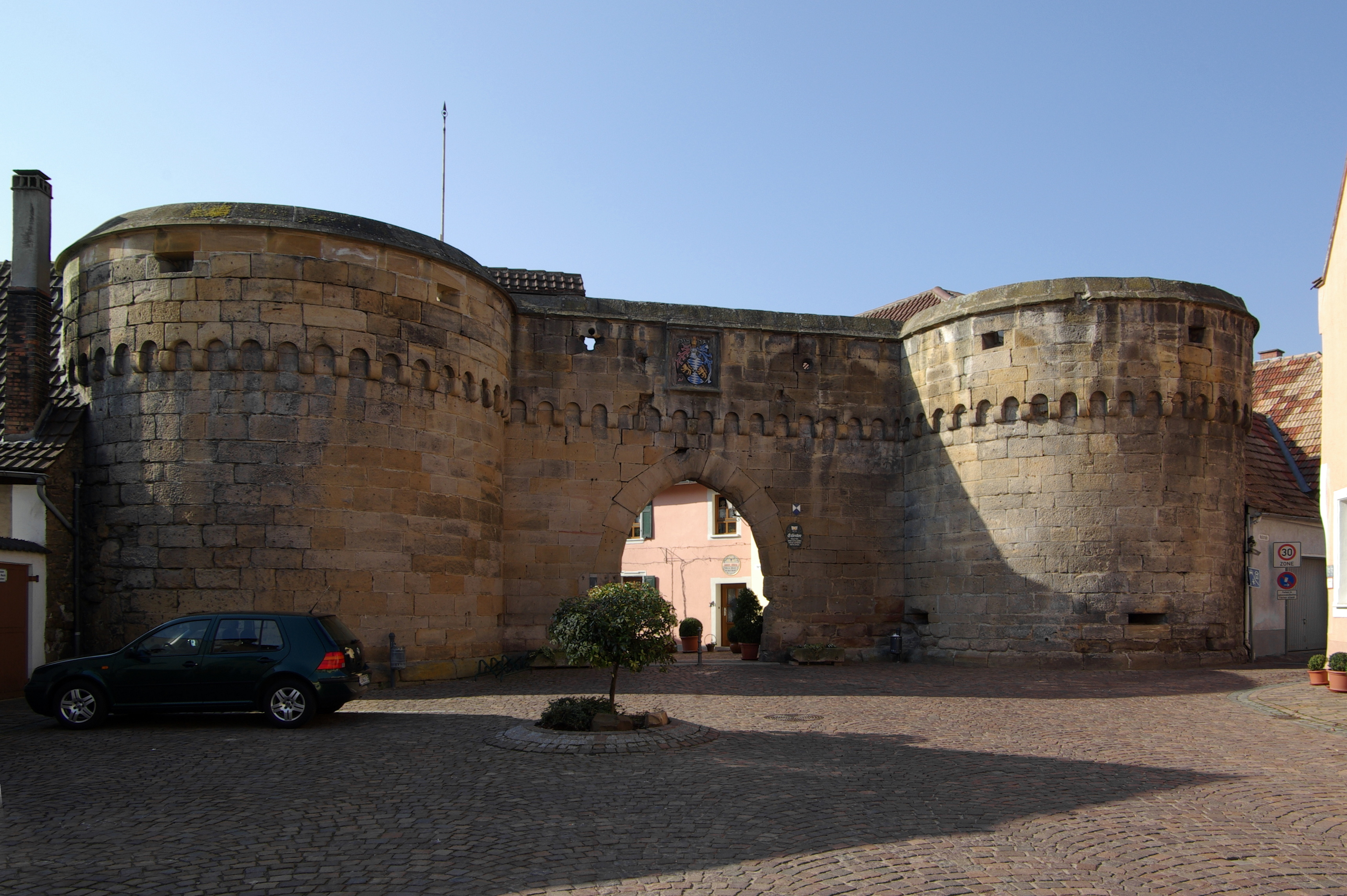 Freinsheim, Vortor des Eisentores, Feldseite